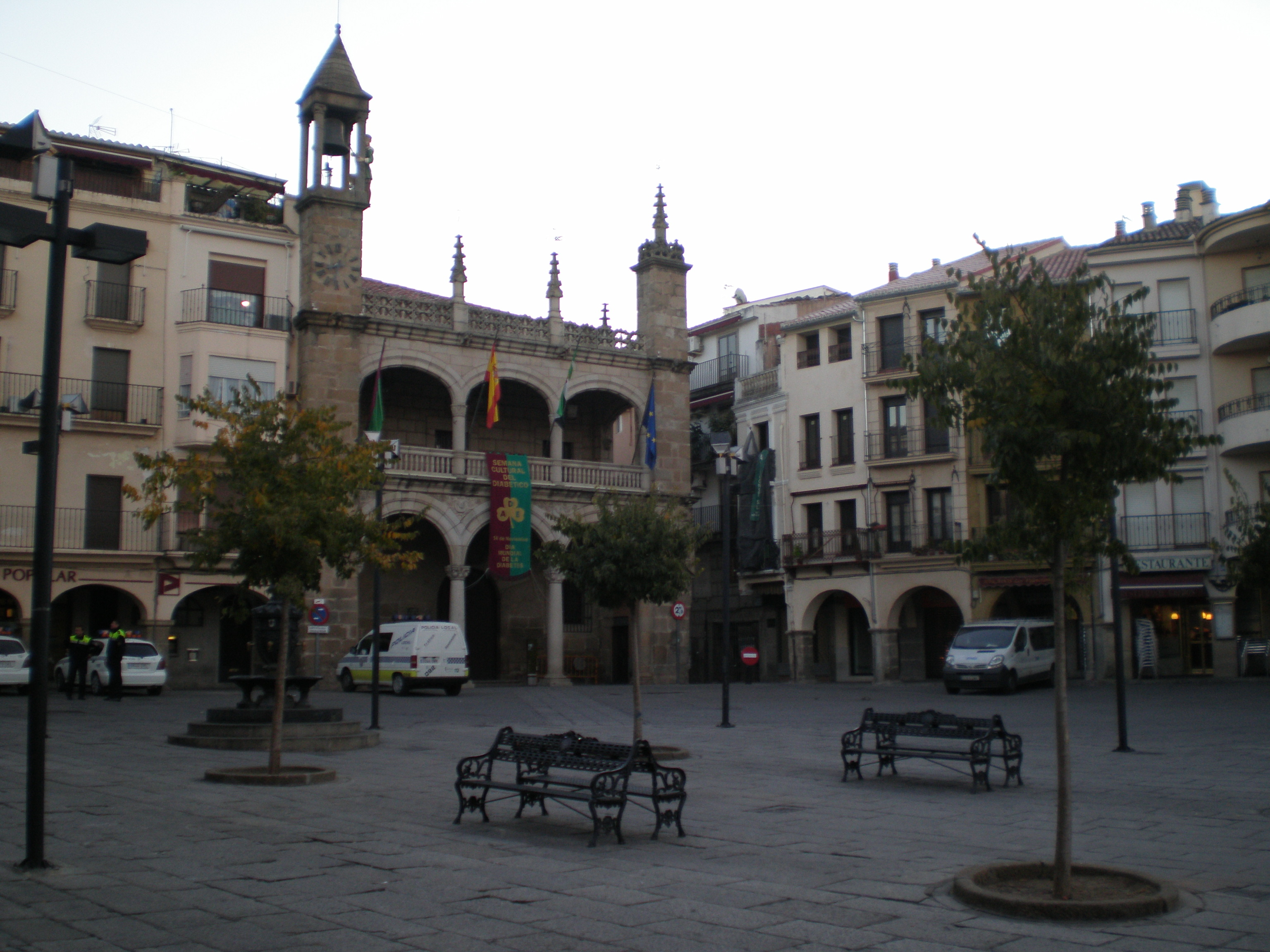 Fotogrfái de la PLaza Mayor de Plasencia